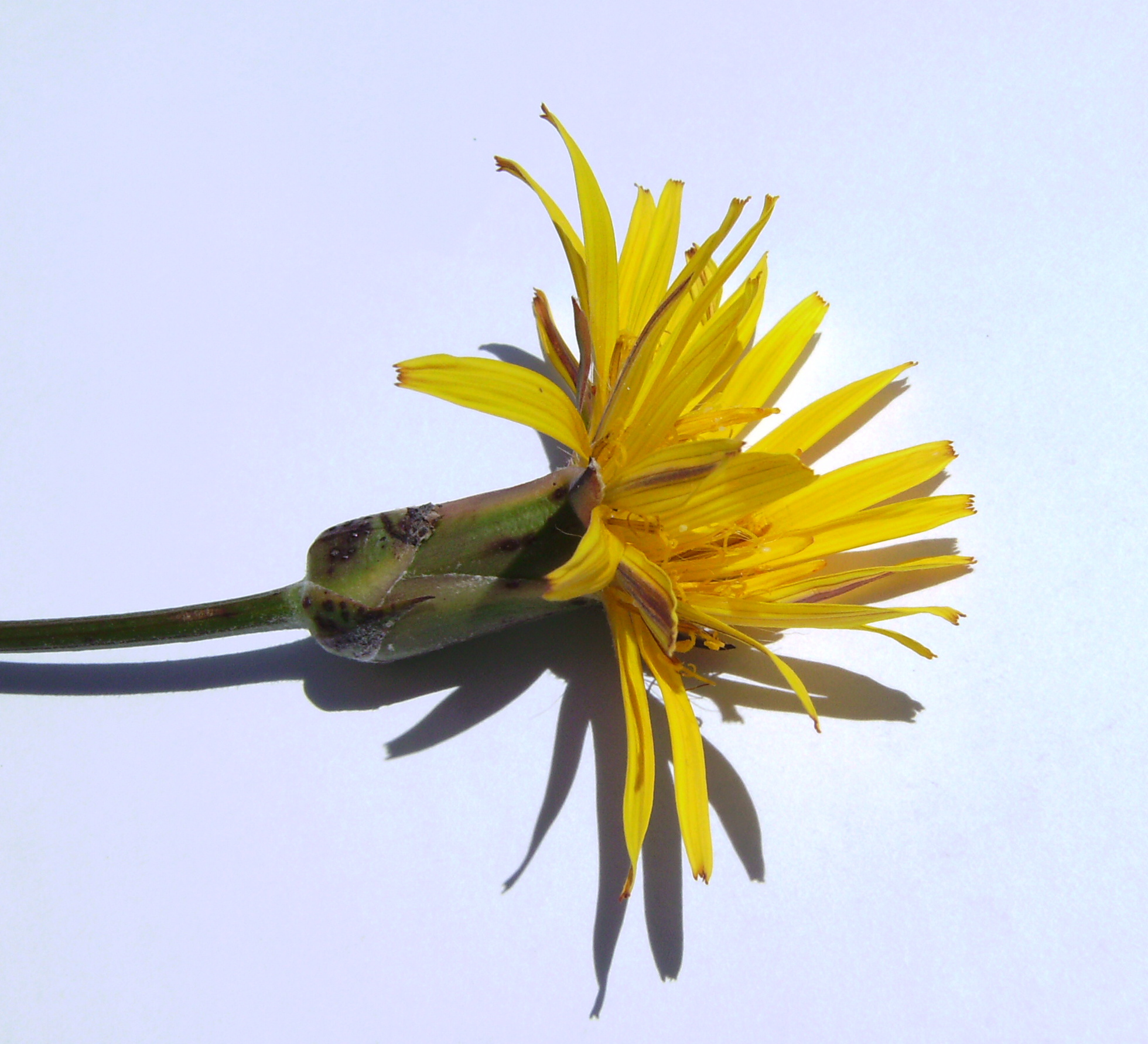 Scorzonera hispanica lower profile, Castelltallat, Catalonia